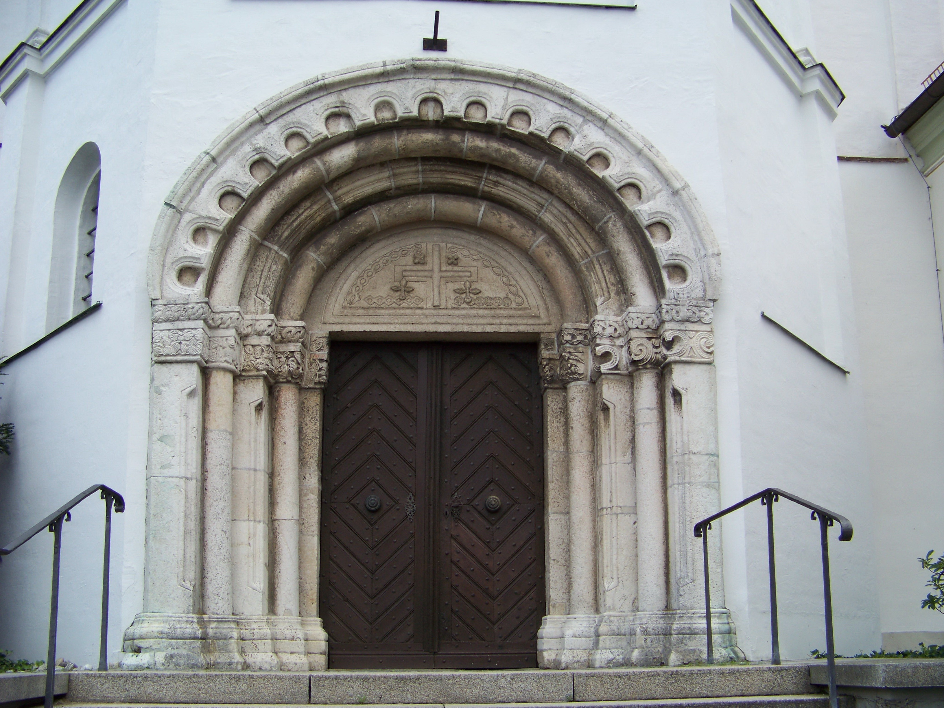 Mallersdorf-Pfaffenberg, Klosterberg 2. Katholische Pfarrkirche, ehemalige Klosterkirche St. Johannes Evangelist. Türme, Langhauskern und Westportal vor 1265 aus hellgrauem Kalkstein.